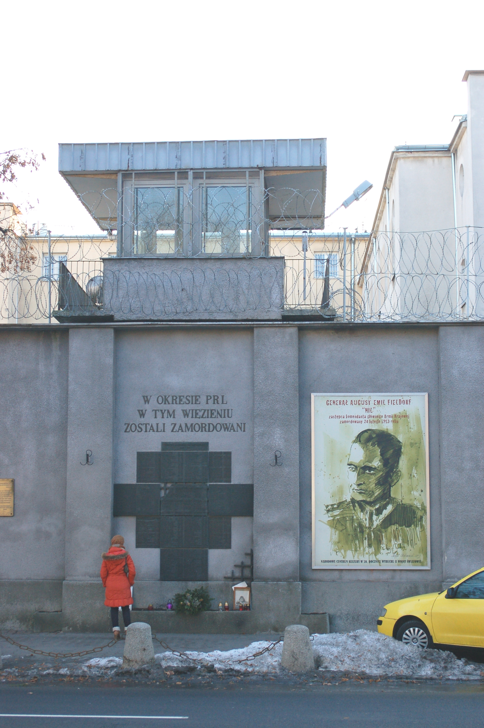 Mokotów Prison